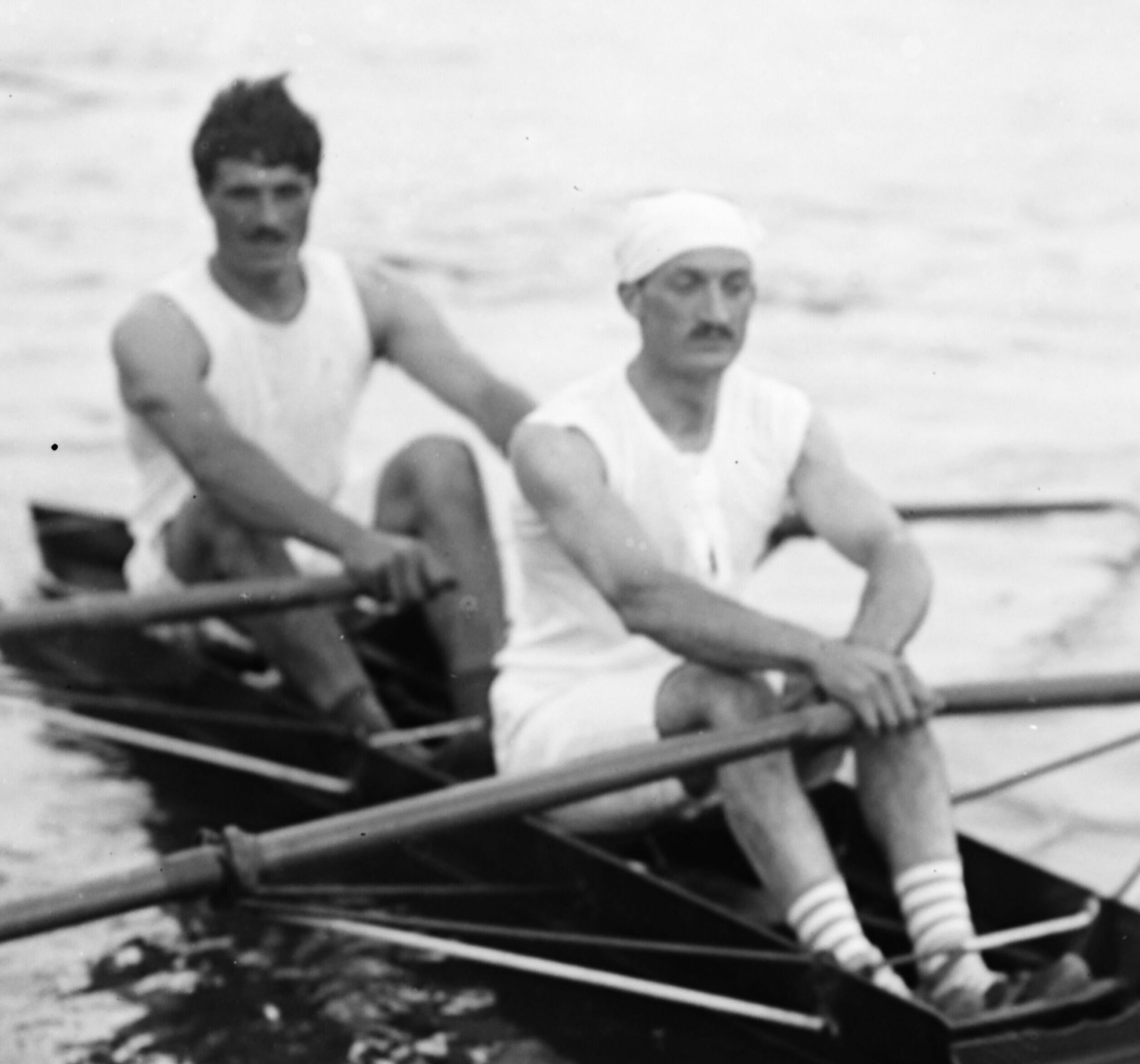 Plé [et] Giran, [gagnants du 2 de couple, championnats d'Europe d'aviron, Mâcon, 15/8/20] : [photographie de presse] / [Agence Rol]